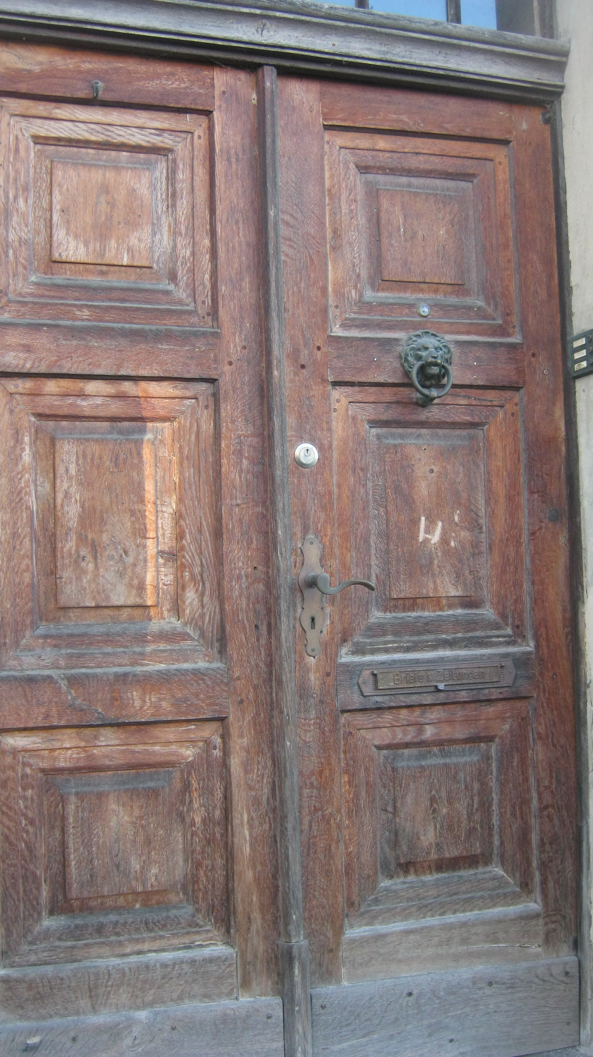 Tür Brauerei